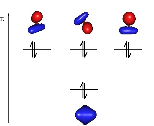 Orbital Molekularraren Teoriaren arabera metanoaren balentzia elektroien orbital molekularren diagrama.